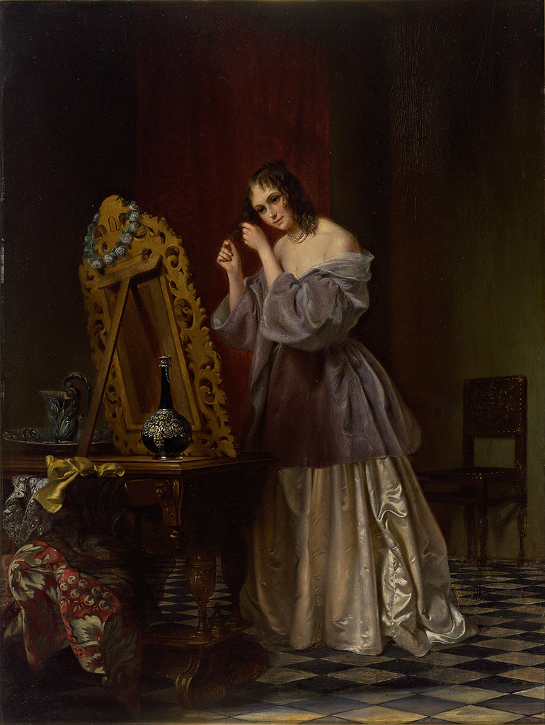 Junge Frau bei der Morgentoilette in elegantem Boudoir. Signiert. Öl/Holz. 49,5 x 37 cm